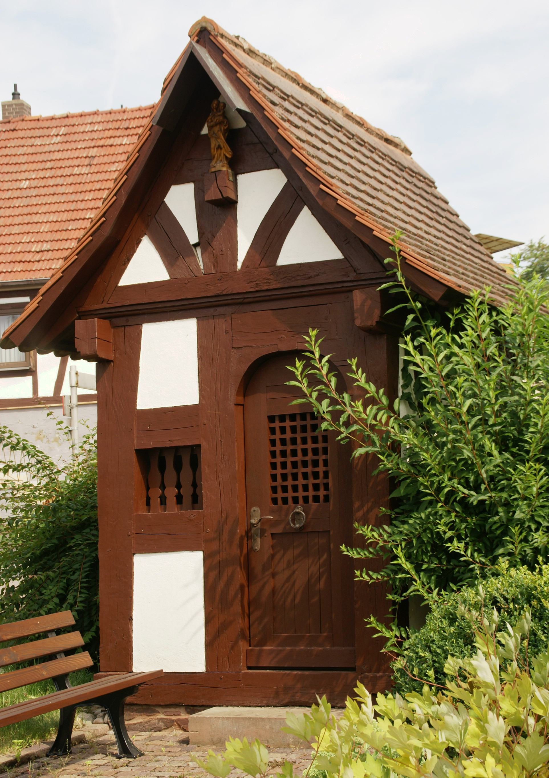 Das Pesthellchen von etwa 1650 in Strötzbach nach seiner Renovierung